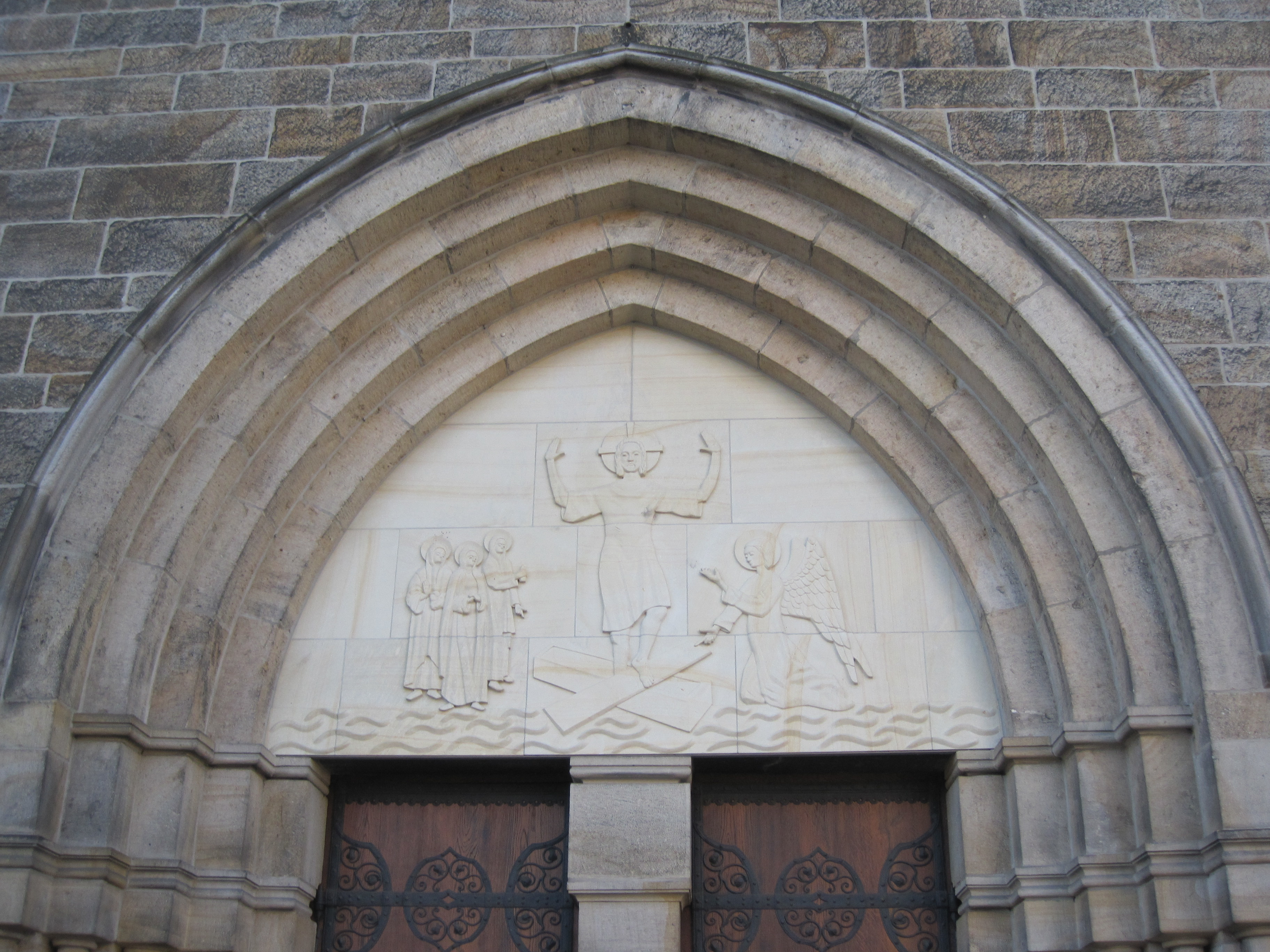 Das Foto zeigt das Tympanon an der St. Stephanus-Kirche in Hamm-Bockum-Hövel.